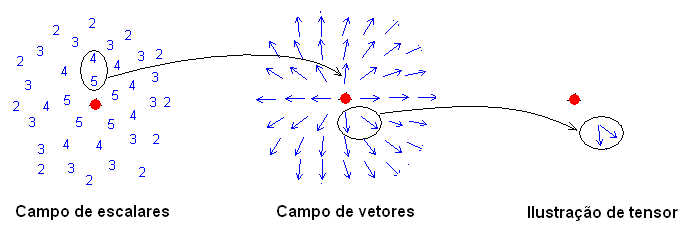 Ilustração da idéia de tensor.